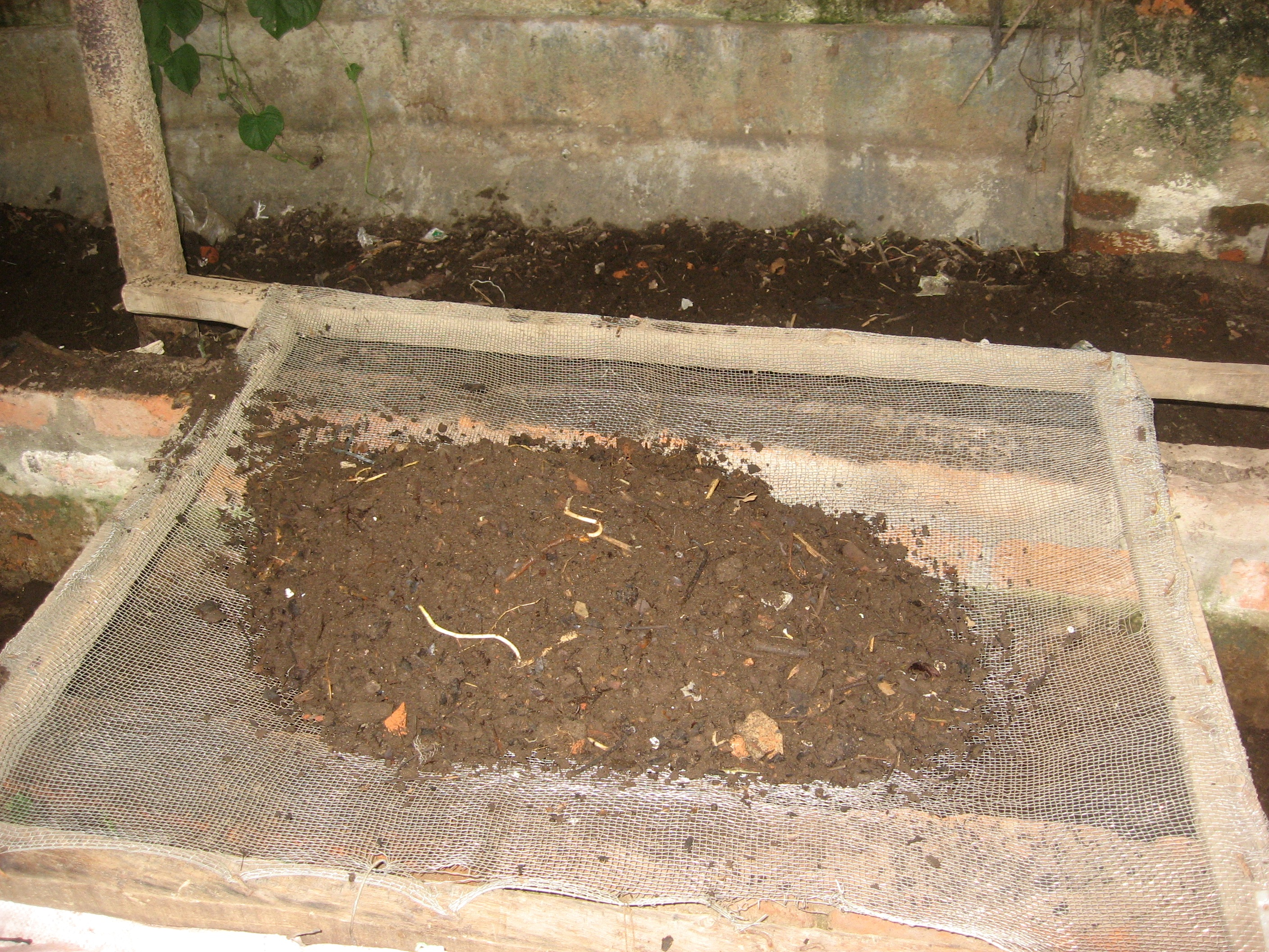 অসমীয়া: চালনীৰ সহায়ত কেঁচু চেকনী